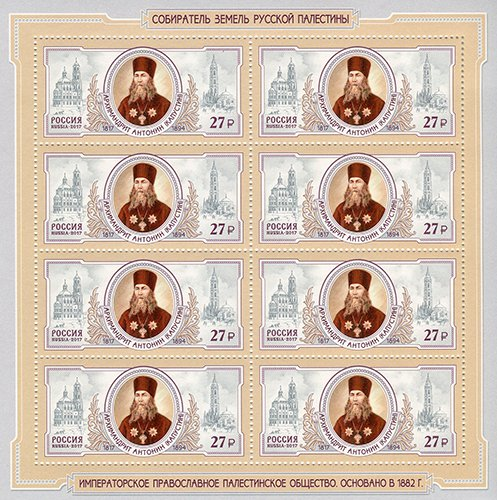 Антонин (Капустин), почтовая марка РОССИЯ